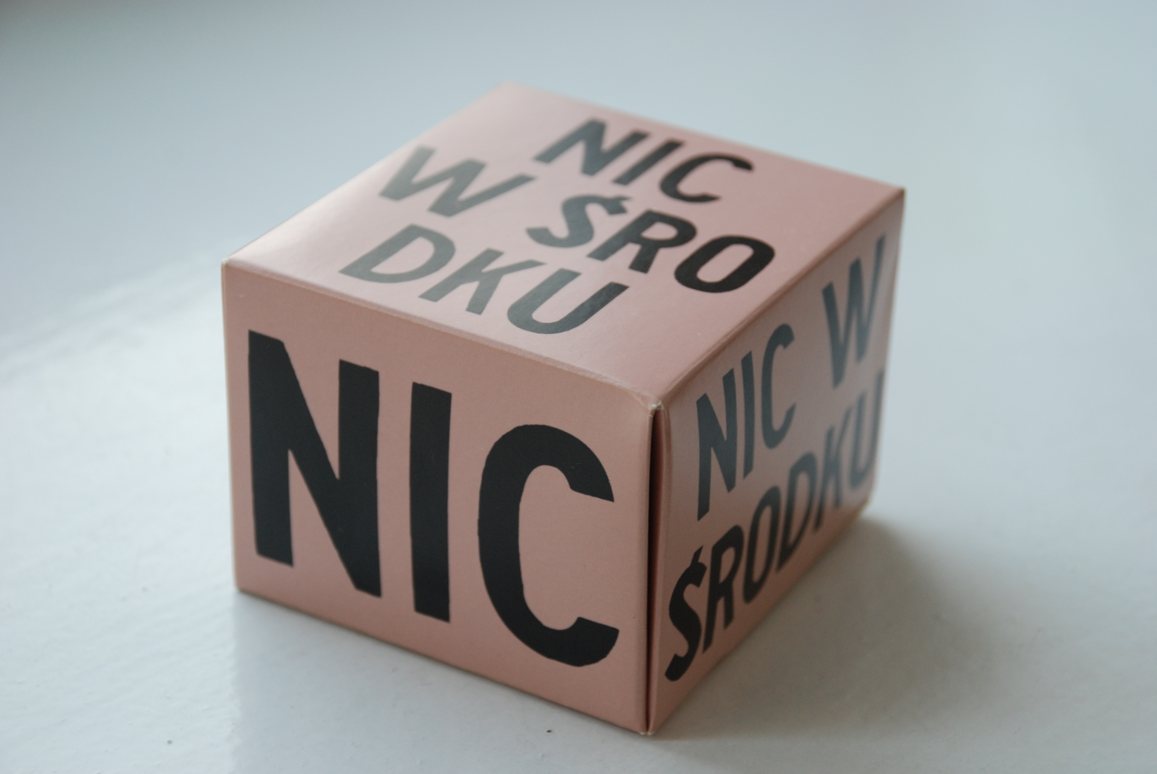 Nic w środku!, Jadwiga Sawicka, 2003 (en: Nothing inside!)